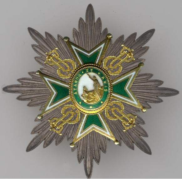 Eigen tekening Robert Prummel